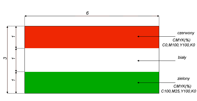 Flaga Węgier z naniesionymi wymiarami ikolorystyką